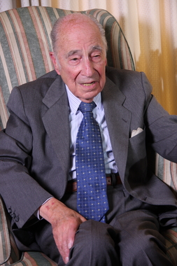 Gustavo Lorca Rojas, político chileno.